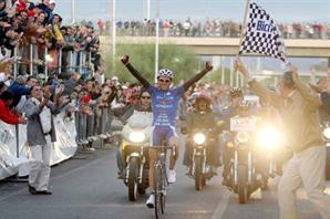 jorge pi consagrándose campeon